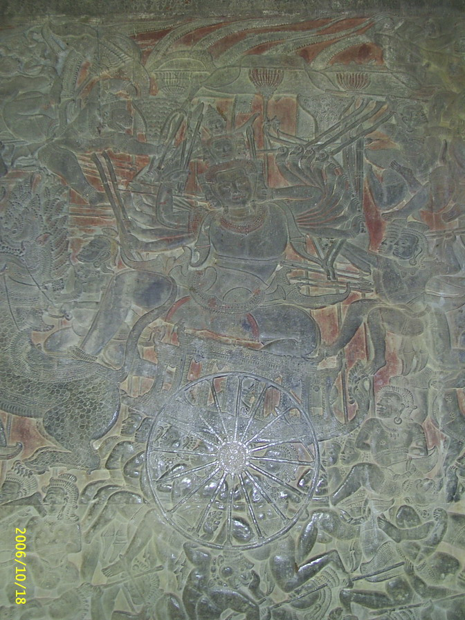 小吳哥